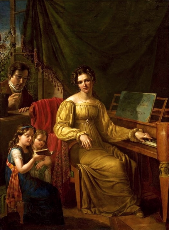 Self-portrait